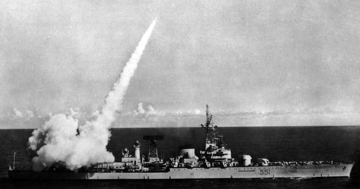 11 novembre 1962 - Lancio del primo missile da parte di un’unità della Marina italiana; si tratta di un missile “Terrier" lanciato dall'incrociatore Giuseppe Garibaldi